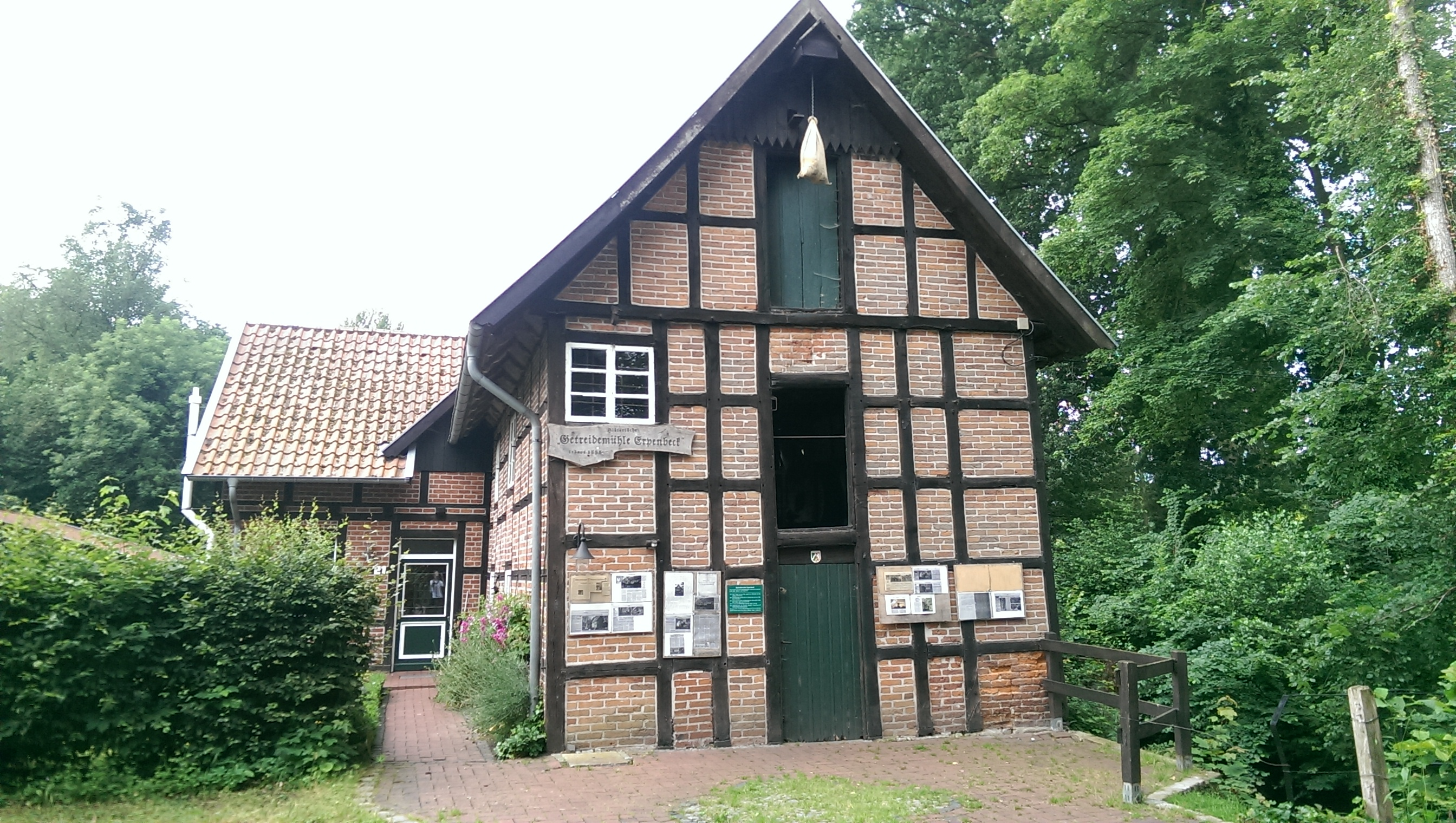 Die Getreidemühle ist Teil einer Mühlenanlage bestehend aus einer Öl-, Boke-, Zichorien- sowie einer Sägemühle.